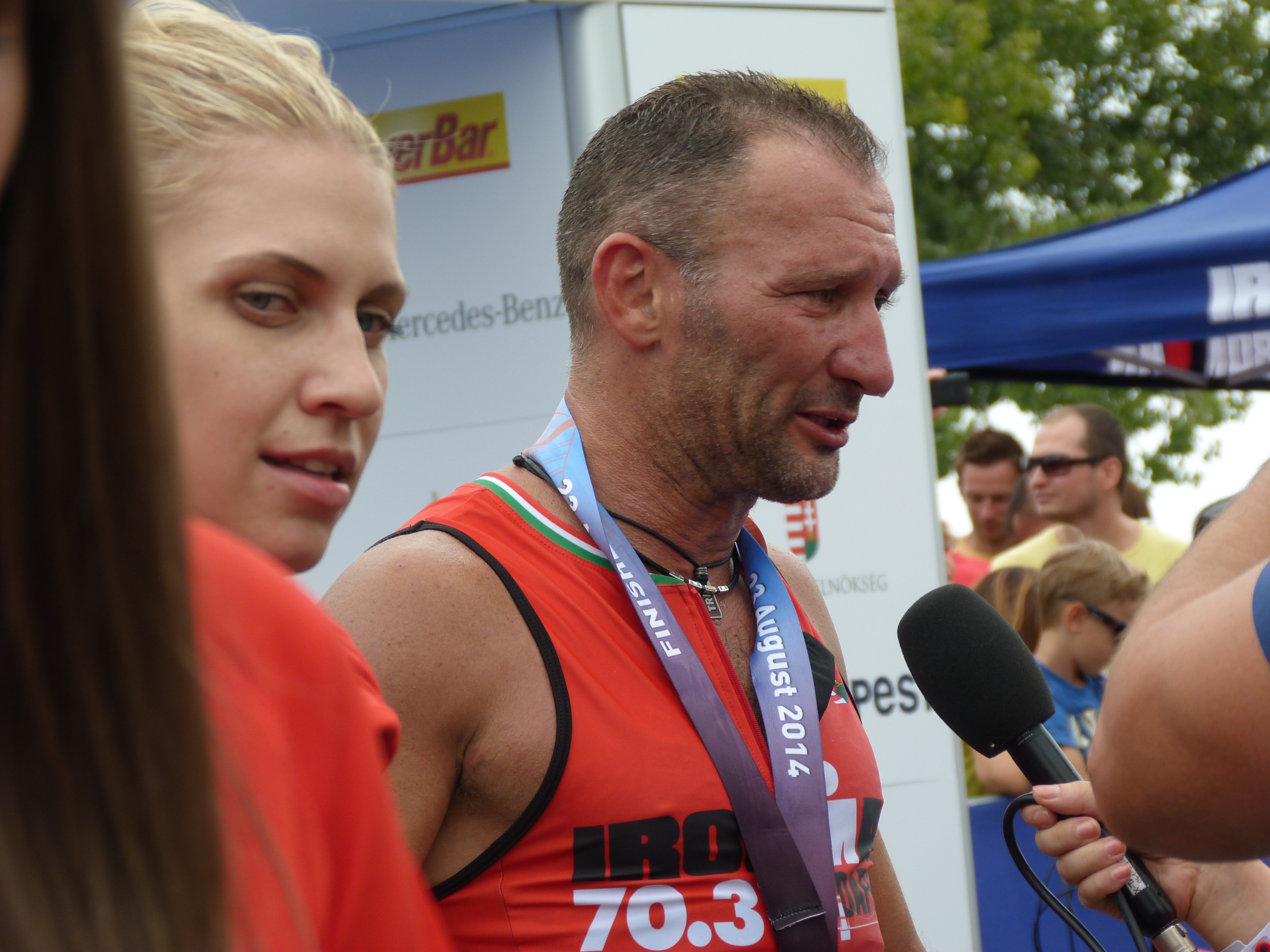 A felvételek 2014. augusztus 23-án, szombaton készültek Budapesten, a Kopaszi-gáton. Ironman 70.3. A triatlon versenysorozat 2006-ban indult az eredeti IRONMAN versenytávok felén. A 2014. augusztus 23-án Budapesten megrendezett IRONMAN 70.3 sporttörténeti esemény: Budapest az első közép-kelet európai város ahol IRONMAN logó alatt triatlon versenyt szerveztek. ©© Derzsi Elekes Andor, Budapest 2014, You are authorised to use these photos and vids under Creative Commons – even for commercial, for profit purposes. Photos must be attributed to Derzsi Elekes Andor. All of the photos and vids in the Metapolisz DVD line are under Creative Commons and can be used even for commercial – for profit – purposes. Recommended Citation Derzsi Elekes Andor: Metapolisz DVD line